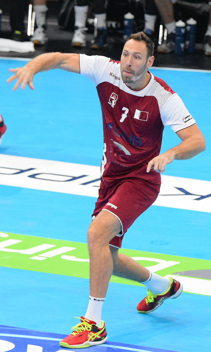 Bertrand Roiné , le 10 janier 2016 lors du match Norège / Qatar durant la Golden League à l'AccordHotel Arena (Paris).